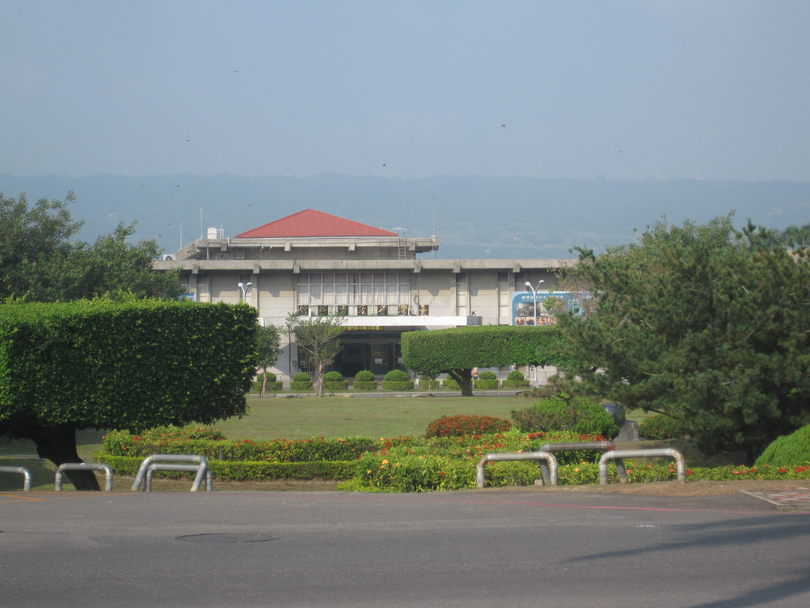 臺灣省政資料館，南投縣歷史建築。